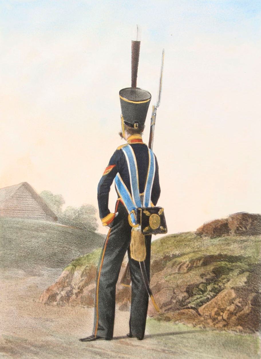 Унтер-офицер Лейб-гвардии Преображенского полка. 1833-1843.